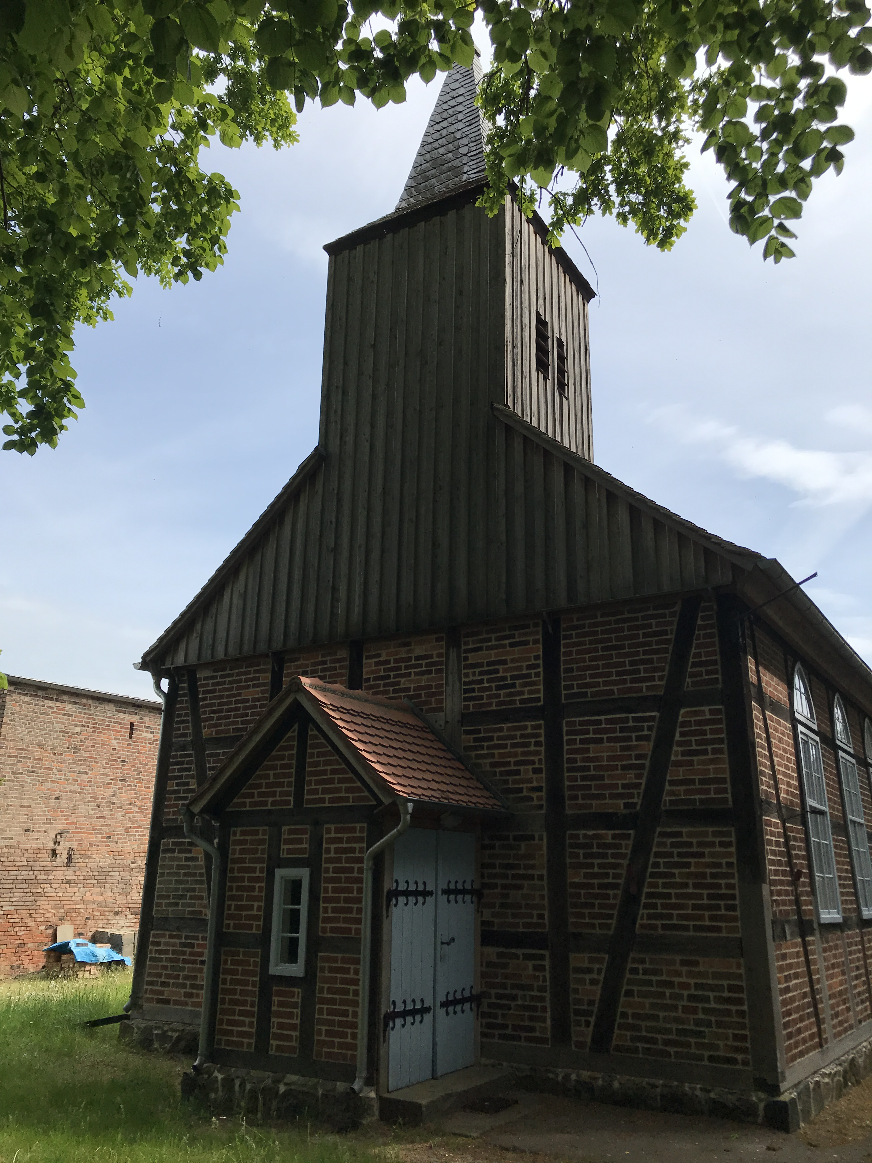 Dorfkirche Zellendorf in der Gemeinde Niedergörsdorf im Ortsteil Zellendorf im Landkreis Teltow-Fläming in Brandenburg